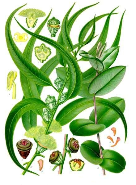 Blaue Eukalyptus. A junger Schössling. B Blühender Zweig der Pflanze. 1 Knospe; 2 dieselbe im Längsschnitt; 3 geöffnete Blüte; 4 dieselbe im Längsschnitt; 5 Querschnitt durch die Staubbeutel; 6 Frucht. A B 1 2 3 4 6 natürliche Grösse, 5 vergrössert.